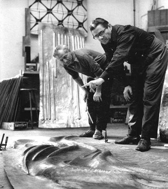 Berlin, "Schmiede" von Fritz Kühn Zentralbild Sturm Ho 24.10.1966 In der Werkstatt des Berliner Kunstschmiedes und Stahlgestalters, Nationalpreisträger Prof. Fritz Kühn. Prof. Fritz Kühn diskutiert mit seinem Kollegen über die Gestaltung des Eingangsportals für die Komische Oper Berlin. (Information: inzwischen ist die Arbeit vollendet und an ihrem Bestimmungsort angebracht worden). (siehe Begleittext und Fotos 7N, 8N, 9N, 10N und D1018-13-1N) Abgebildete Personen: Kühn, Fritz Prof.: Kunstschmied, Fotograf, DDR